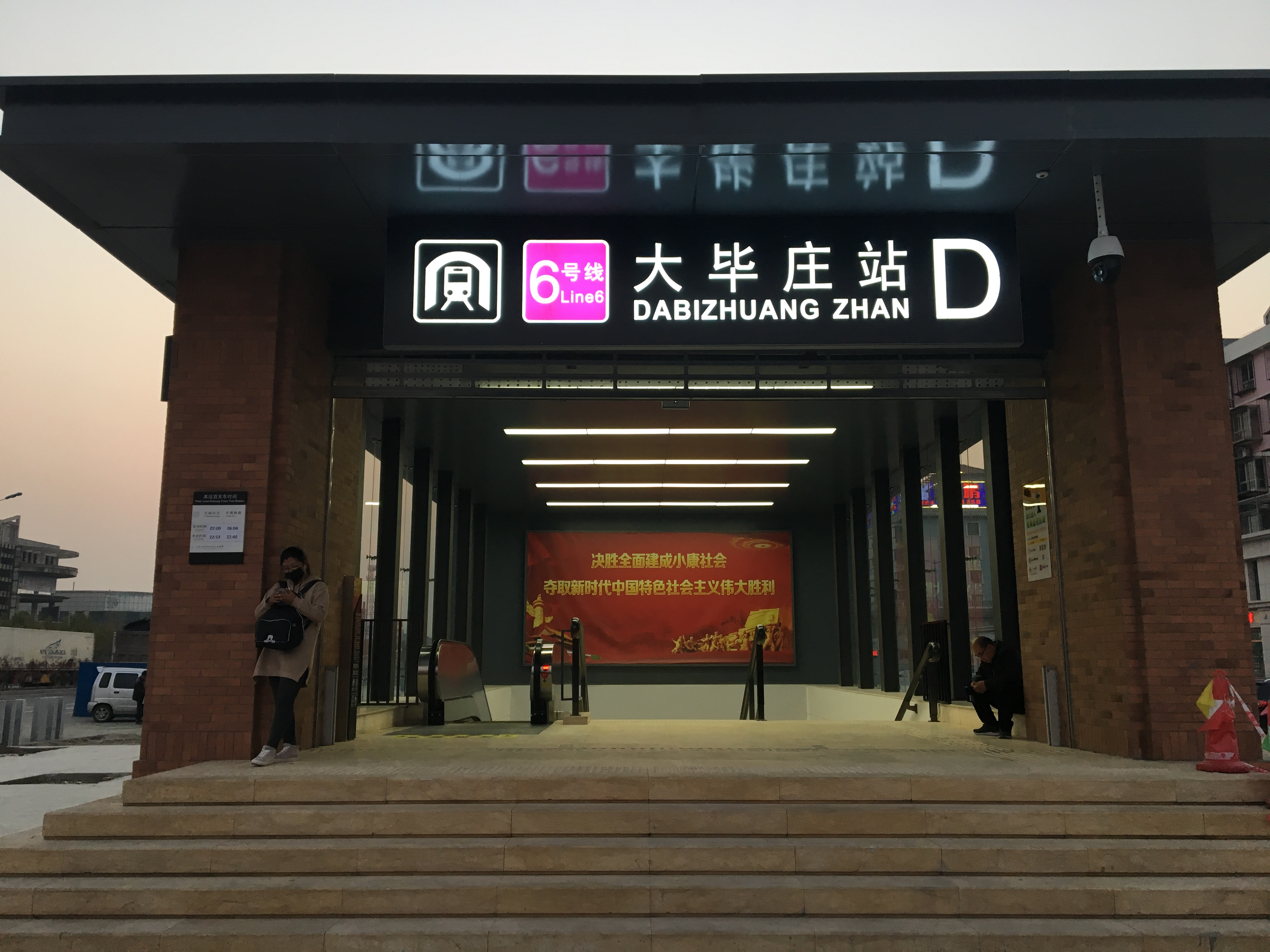 天津地铁6号线大毕庄站D口